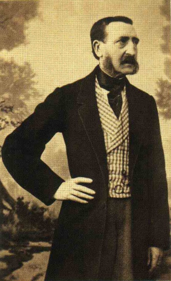 Ritratto fotografico del conte Luigi Sanvitale (Parma, 1799-1876).